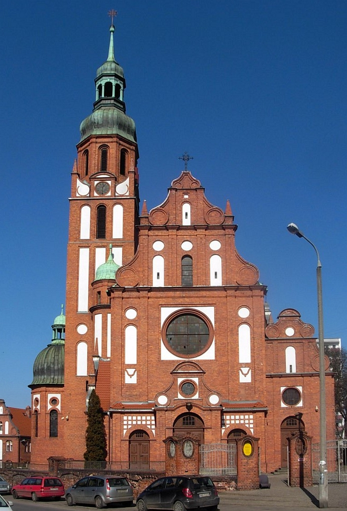 Kościół Świętej Trójcy w Bydgoszczy